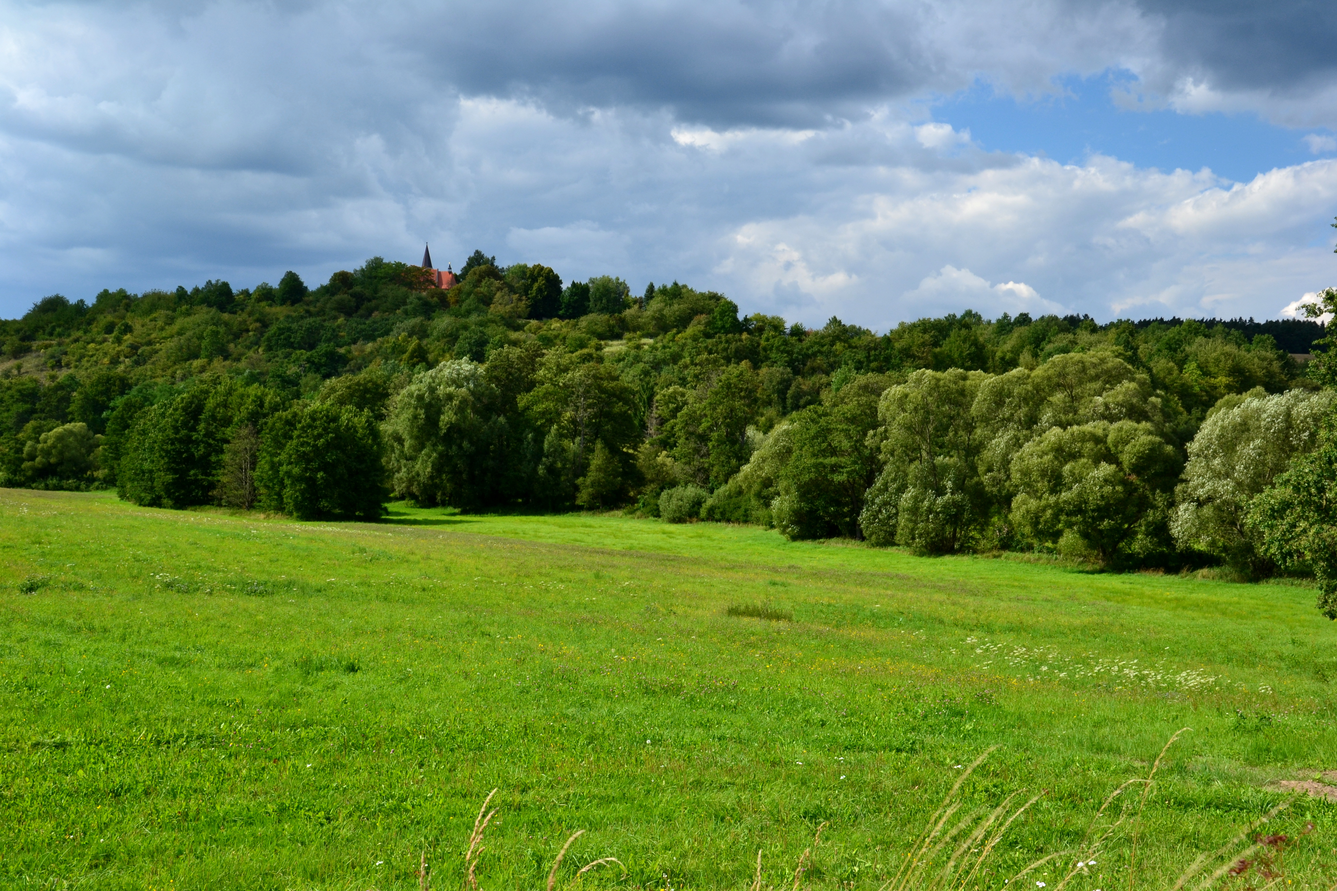 Tasnovice – svatovavřinecký vrch se slovanským hradištěm a kostelem svatého Vavřince